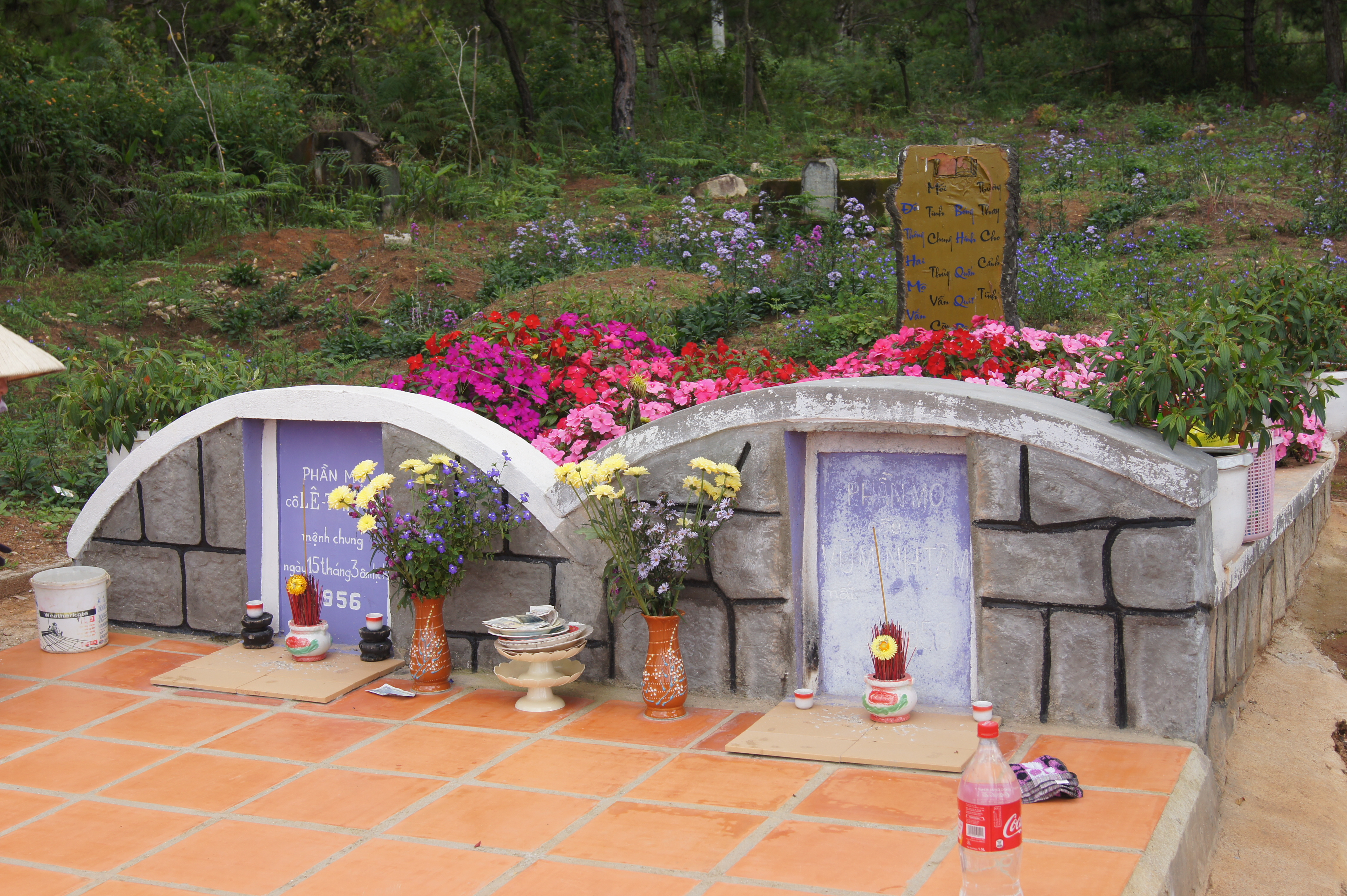 Đồi thông hai mộ - một điểm tham quan ở thành phố Đà Lạt, Lâm Đồng, Việt Nam.